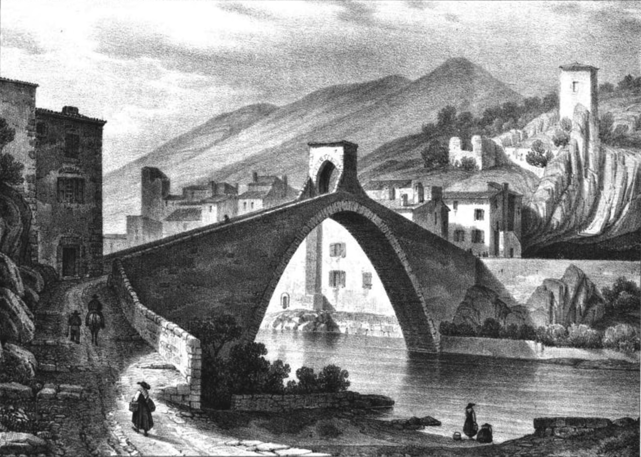 Album du Dauphiné - tome III, lithographie de Nyons (Drome)